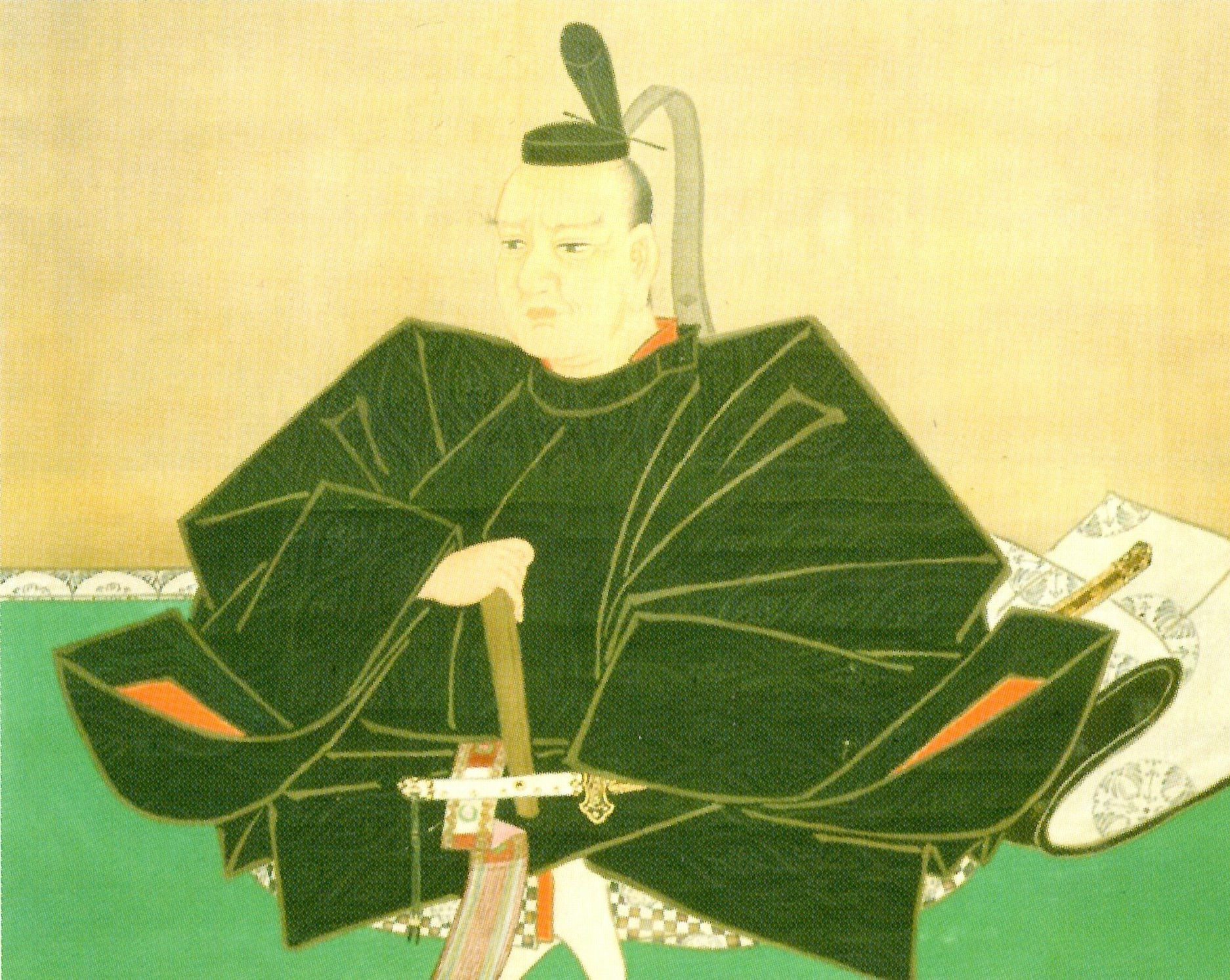 津軽信政の肖像。